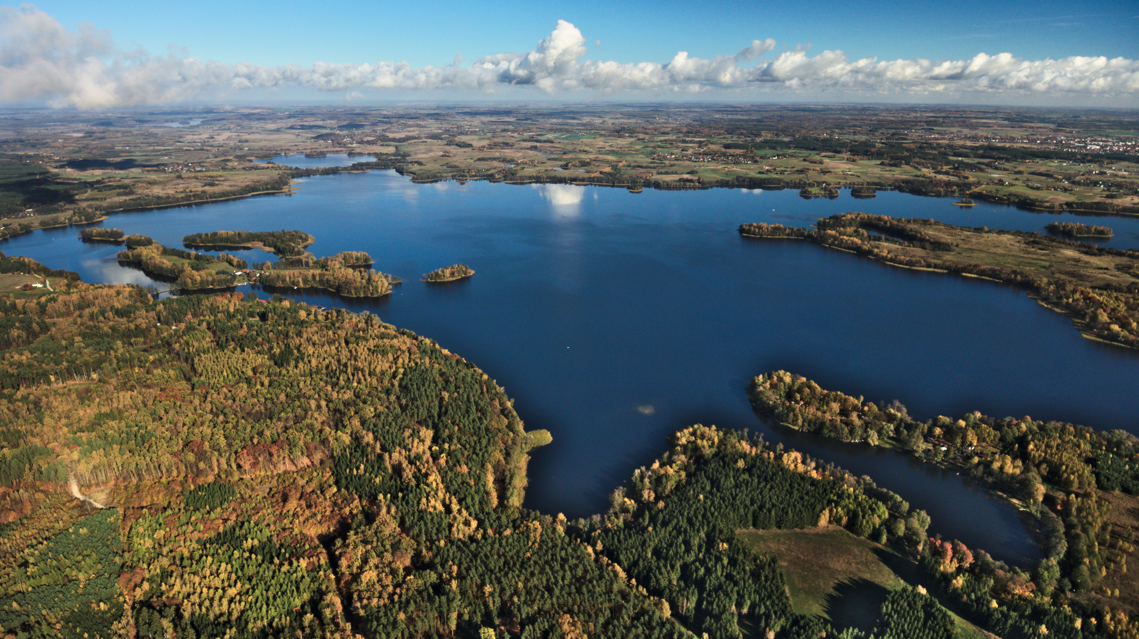 Zdjęcie wykonane z lotu dronem od strony miejscowości Ramsowo. Wykonano przez RecDrone.pl